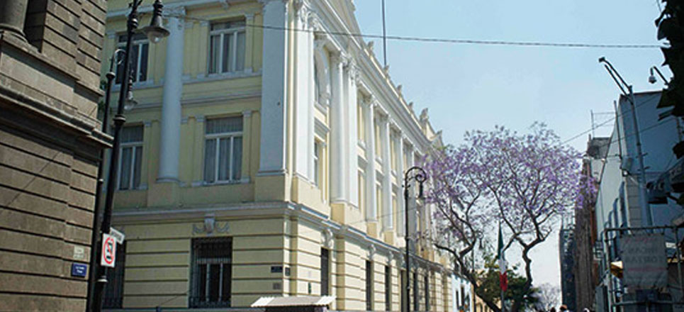 Escuela Nacional de Jurisprudencia en la actualidad.